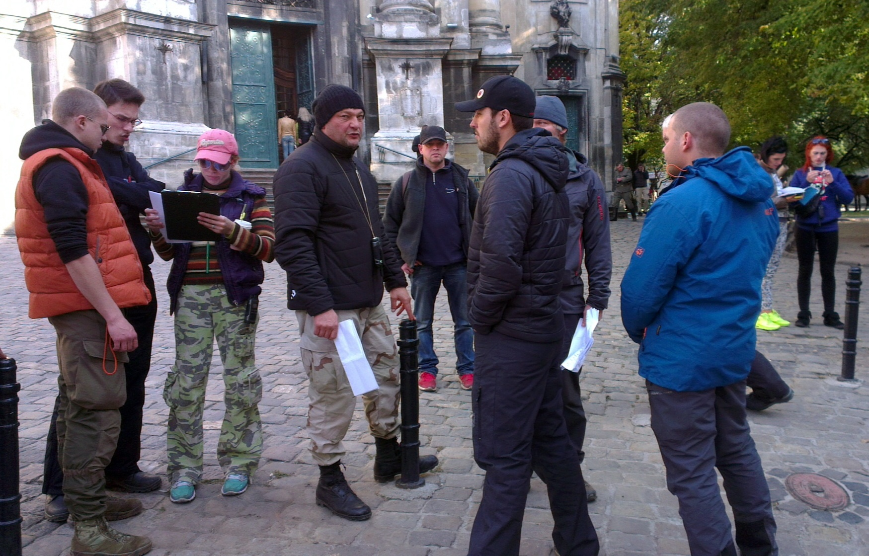 Сергей Гинзбург, российский режиссёр, на съёмках сериала "Волчье сердце"